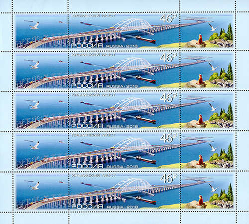 Лист «Крымский мост»